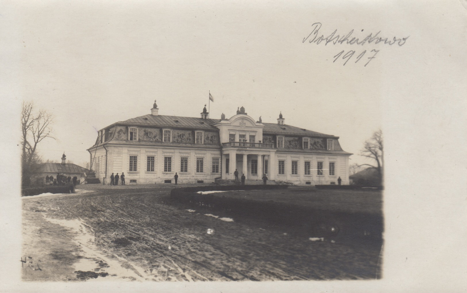 Беларуская (тарашкевіца): Бачэйкаў (Bačejkaŭ), палац Цеханавецкіх (Ciechanaviecki)